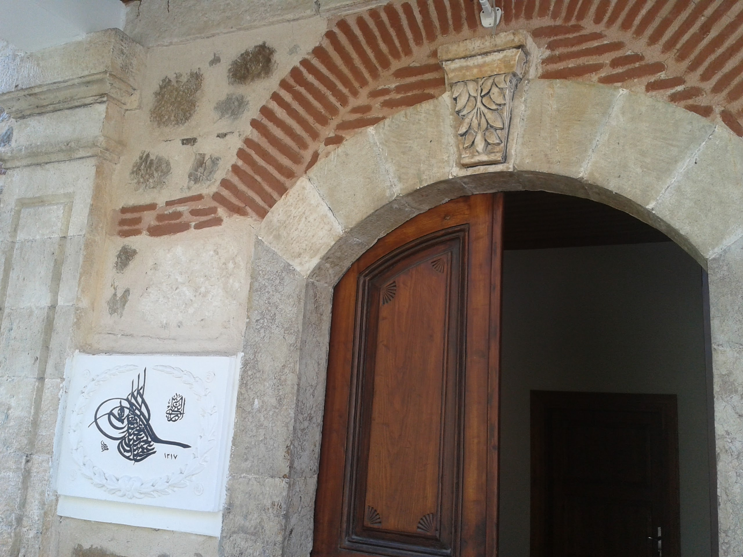 Şereflikoçhisar müzesi çalışmaları